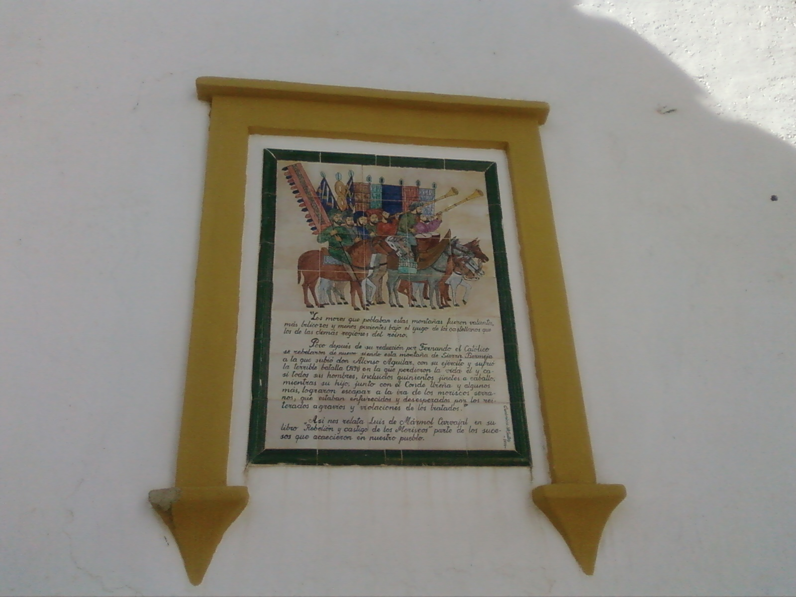 Mosaico que se encuentra en el pueblo de Jubrique y que cuenta hechos ocurridos por aquellas tierras.